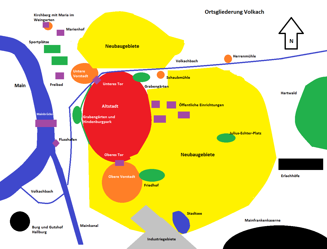 Ortsgliederung Volkach mit markanten Punkten innerhalb des Stadtgebietes und in der Gemarkung der Stadt im unterfränkischen Landkreis Kitzingen. Legende: Rot - Volkacher Altstadt Orange - Historische Ortsteile und Quartiere Gelb - Neubaugebiete des 19., 20. und 21. Jahrhunderts Grau - Industriegebiete Schwarz - Einrichtungen in der Gemarkung Grün - Grünflächen Blau - Gewässer Lila - Einzelne Baulichkeiten